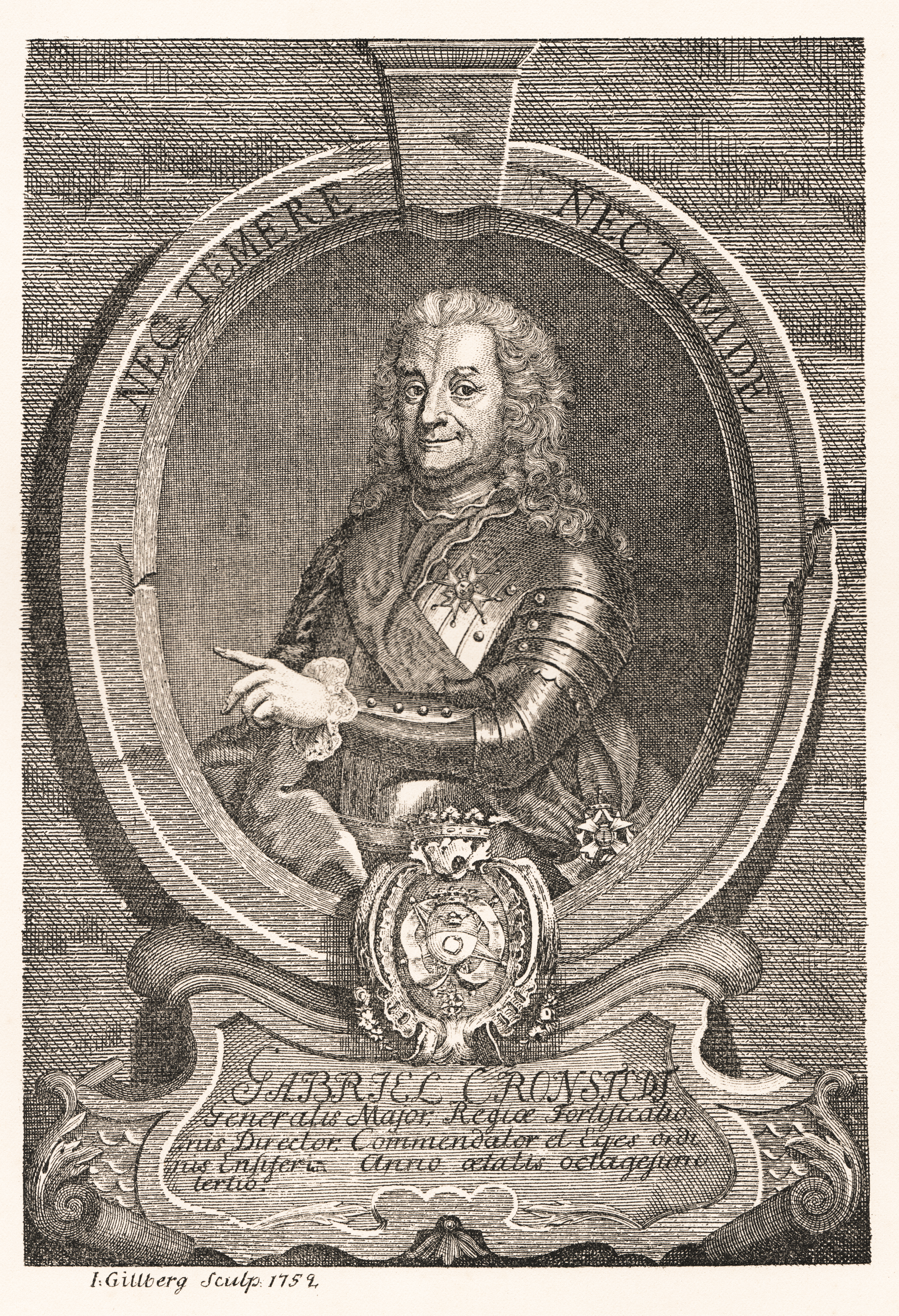 Gabriel Cronstedt (1670-1757).